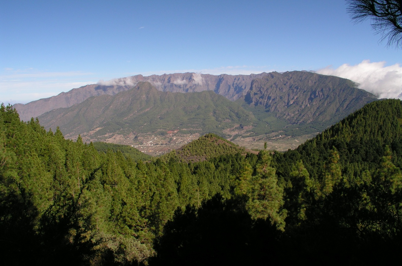 La Palma - Caldera de Taburiente (Blick von Süden)